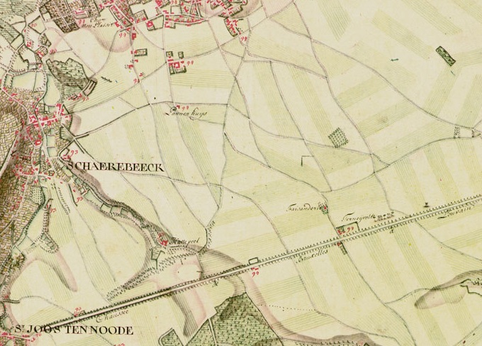 Partie de la carte de Ferraris montrant Evere